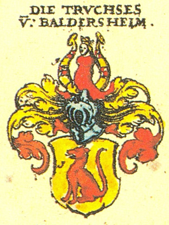 Ritterschaft und Adel in Franken von Baldersheim